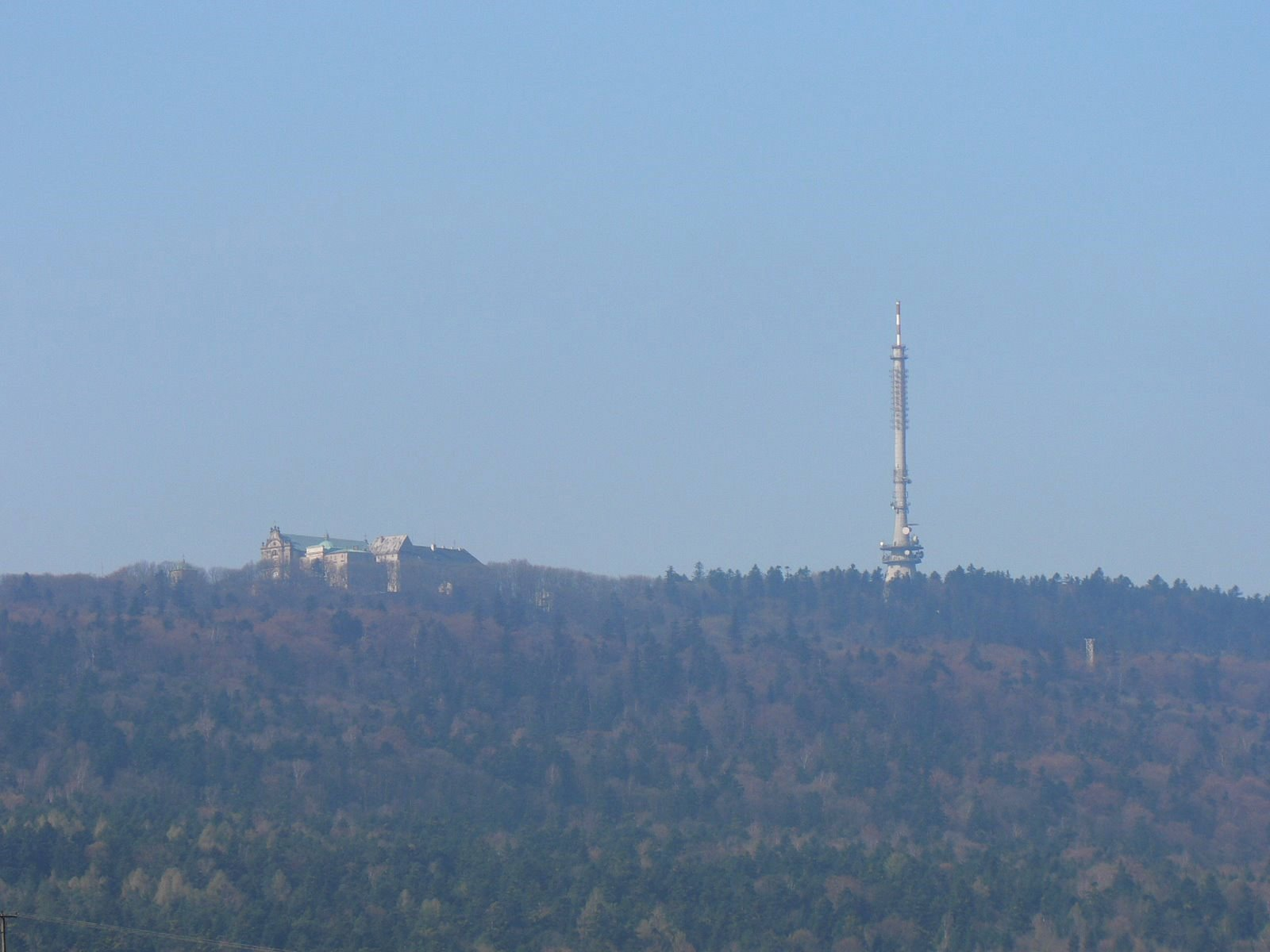 Łysa Góra ze Starej Słupi